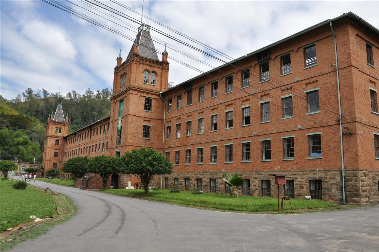 IFRJ Campus Paracambi